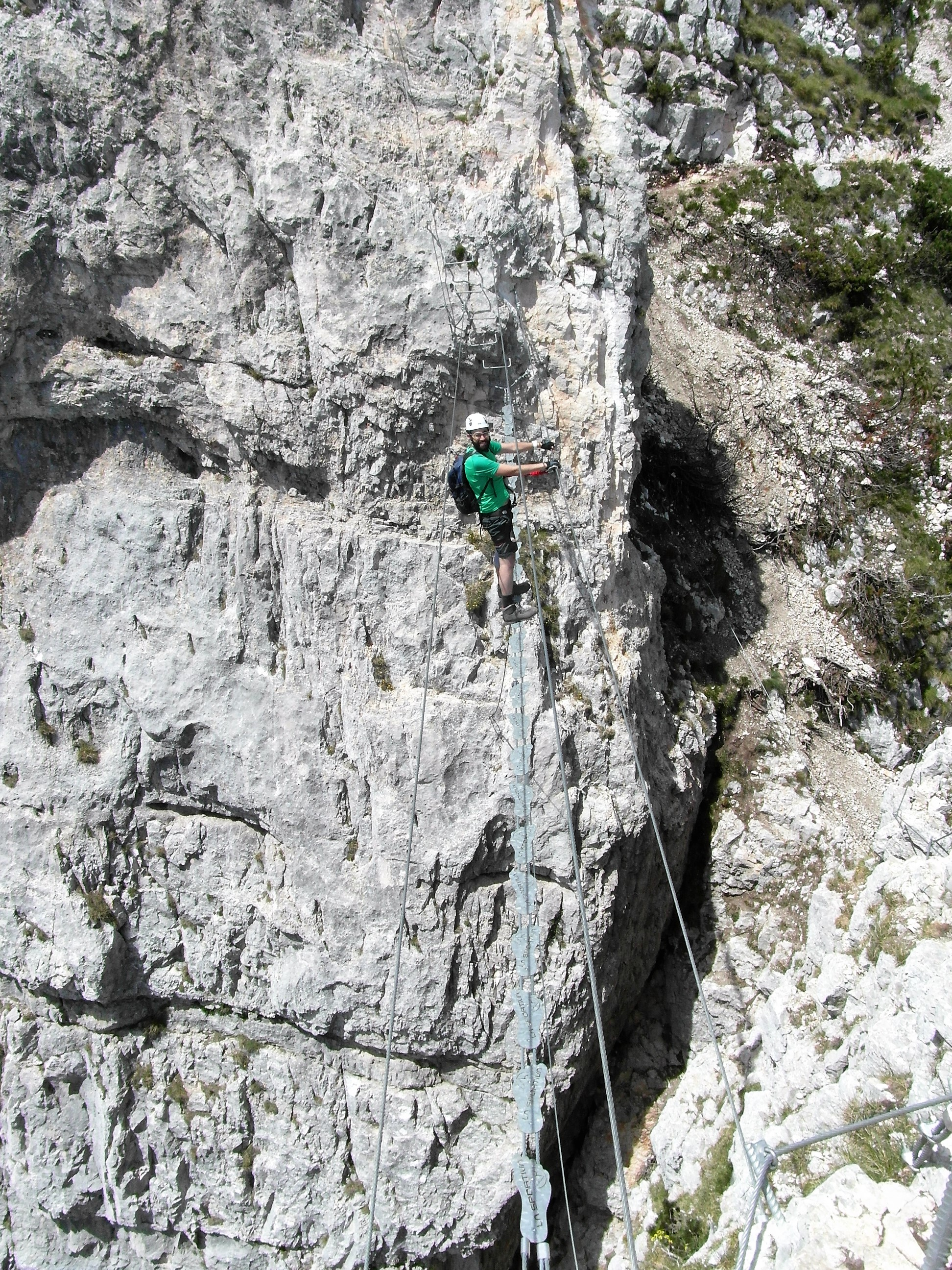 Via ferrata delle aquile